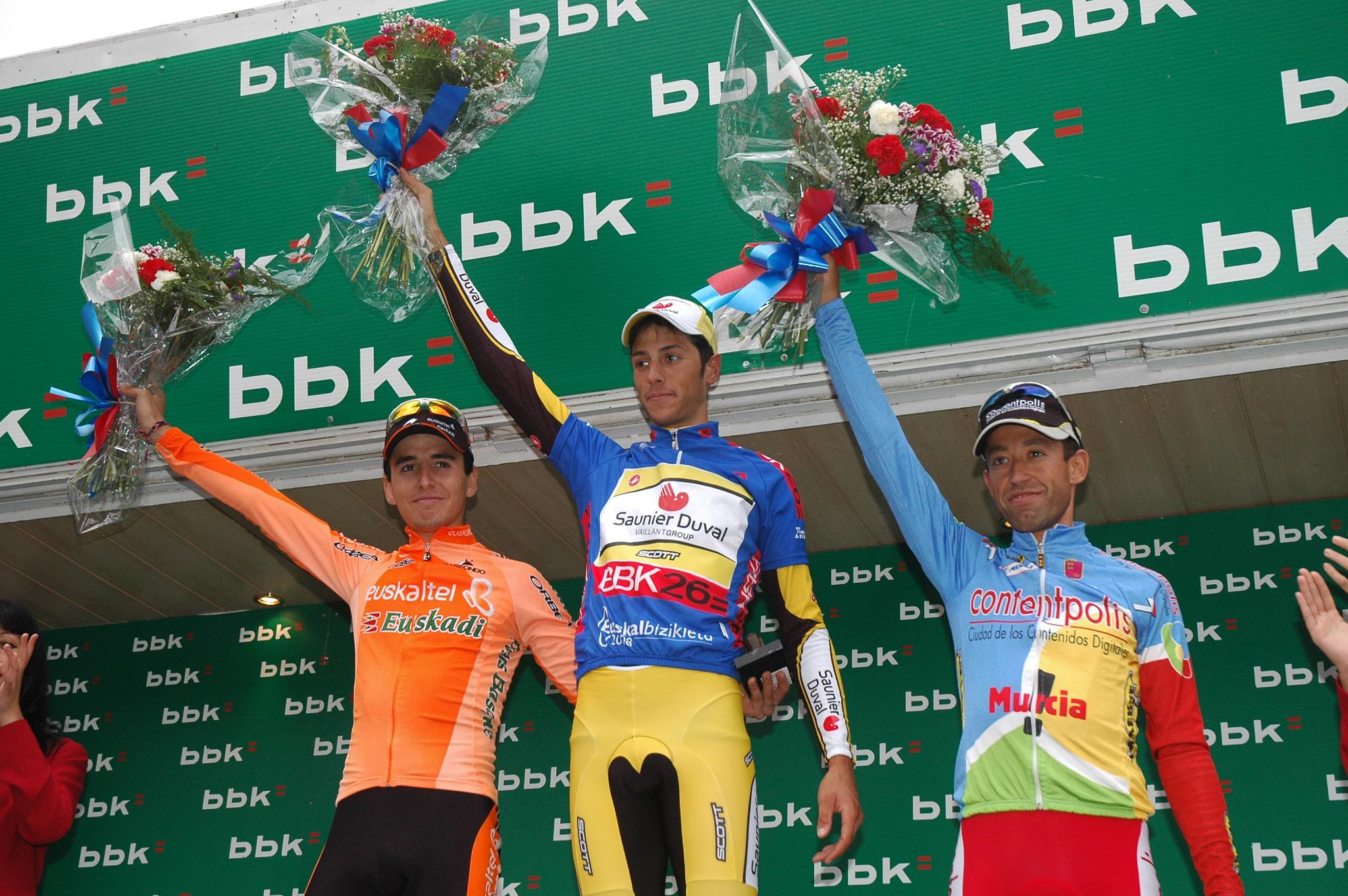 Podium de la Euskal Bizikleta 2008 Eros CAPECCHI flanqueado por Igor ANTON y Adrián Palomares.